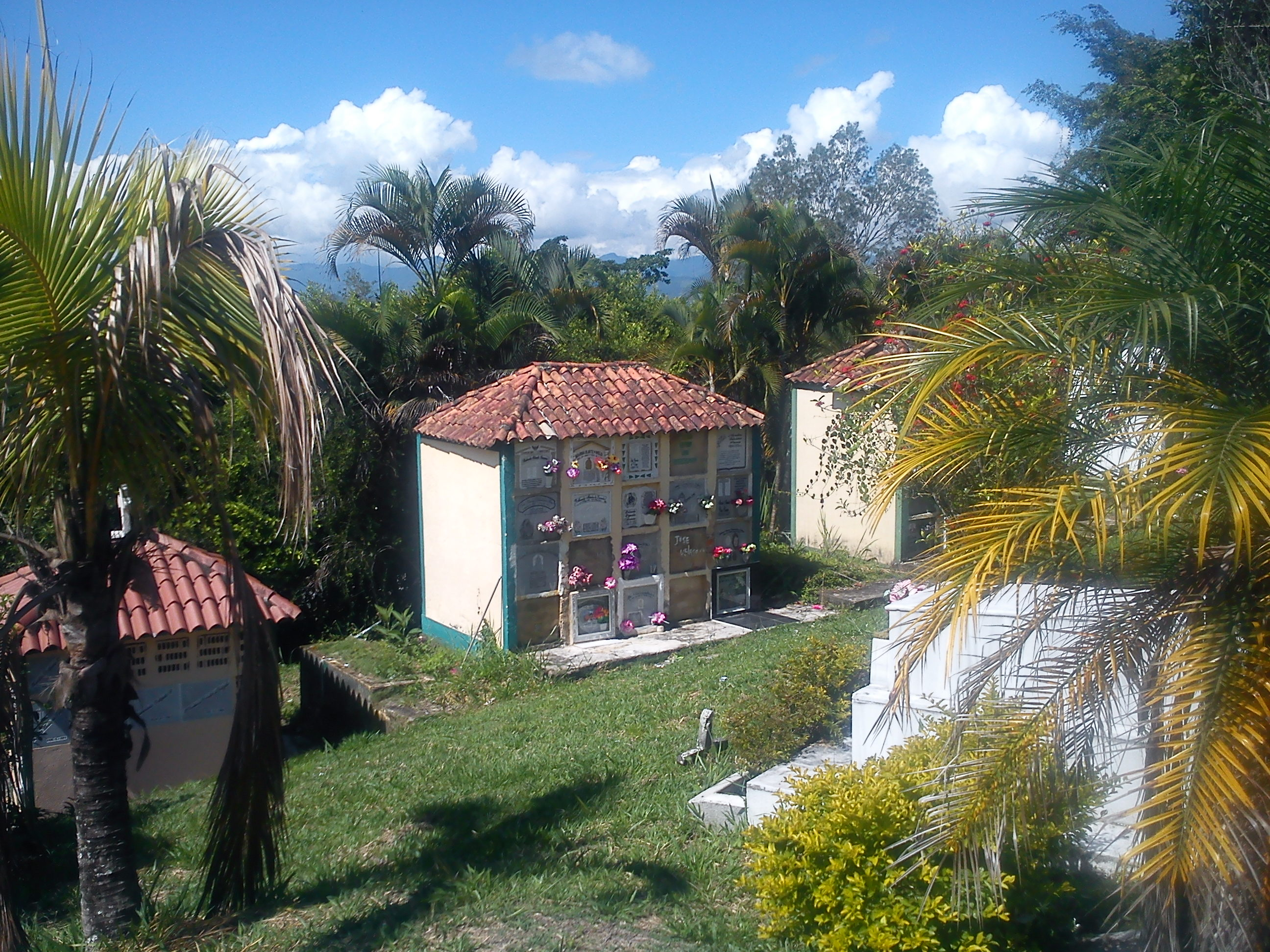 Hřbitov v Nocaimě